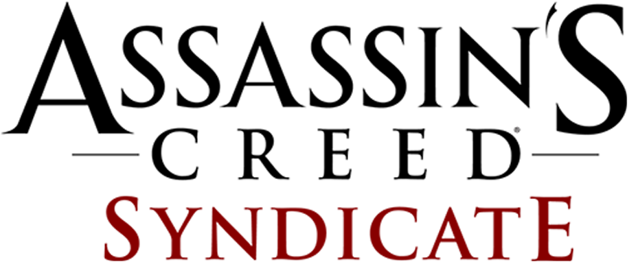 assassins-creed-syndicate-logo